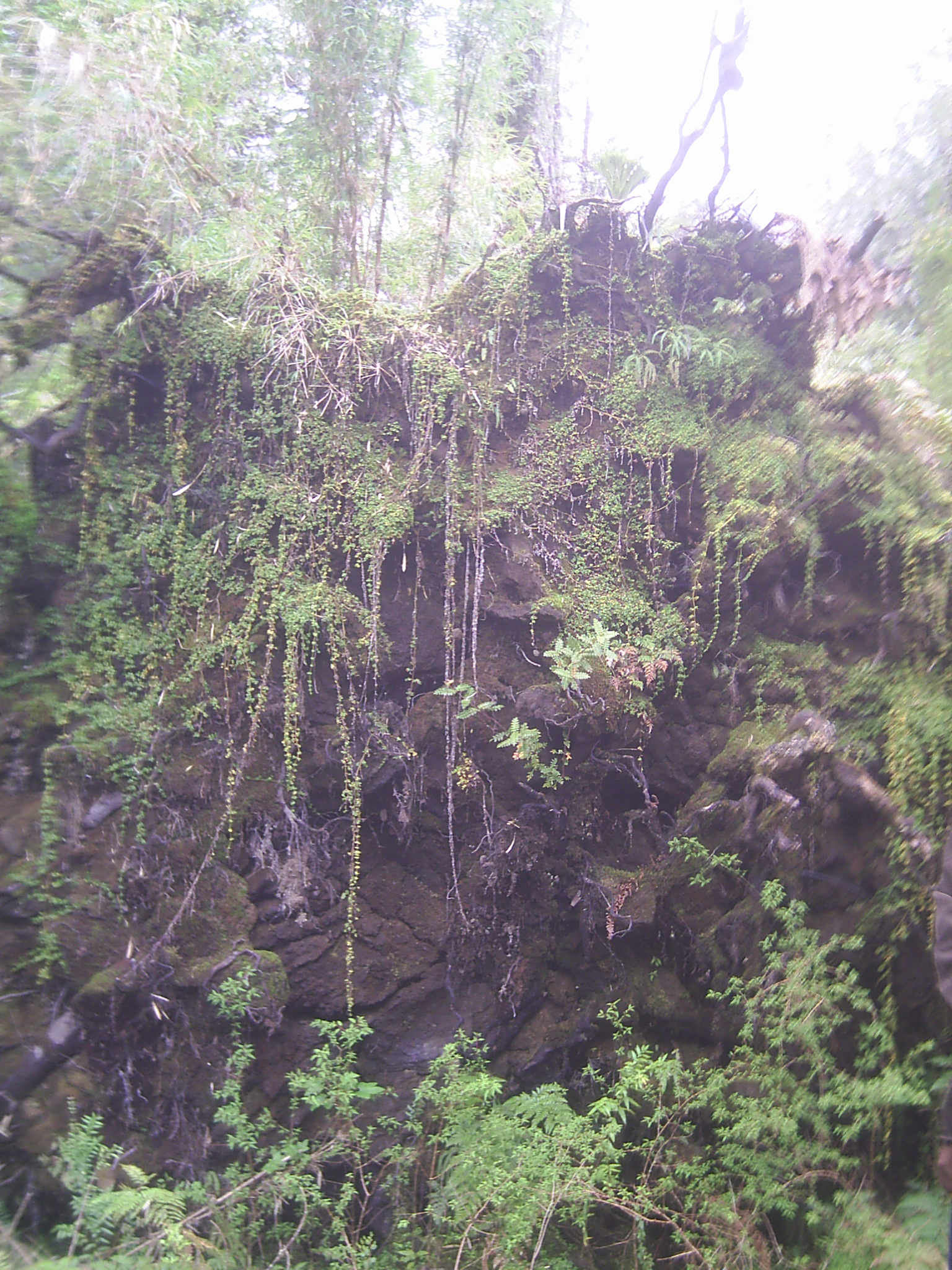 Coihue caído en el Sector del Amarillo, Parque Pumalin